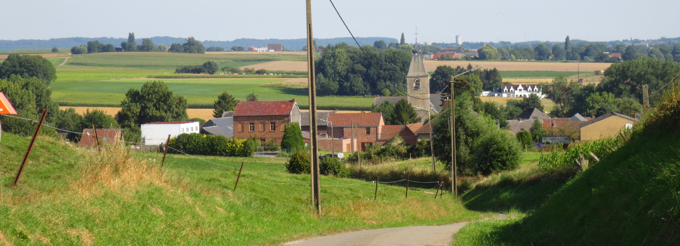 Steenkerque